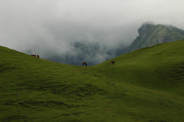 Lariguto valley, suco Ossu de cima, Osttimor